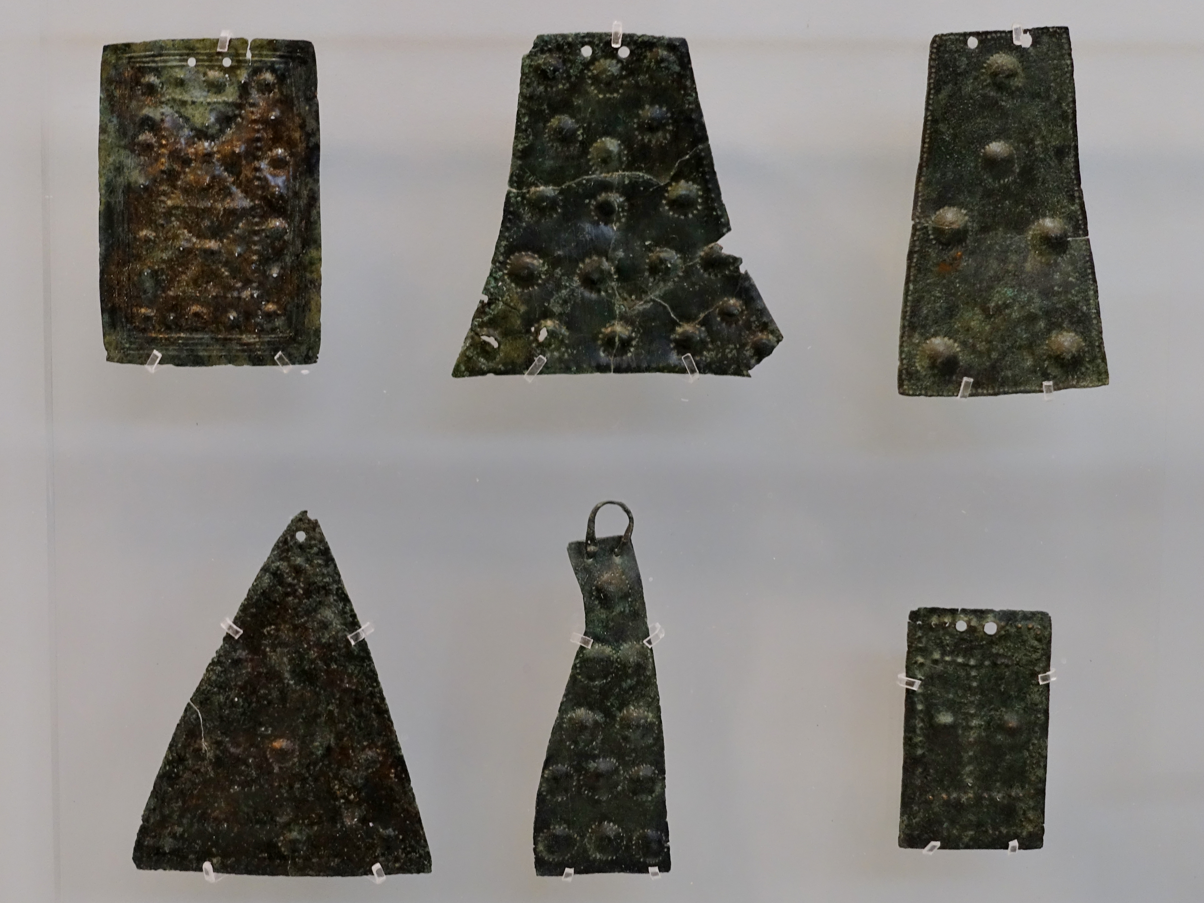 Modellschilde aus Bronze (Geometrische Zeit, 8. Jahrhundert v. Chr.), gefunden im Heiligtum des Hermes und der Aphrodite bei Symi, Archäologisches Museum von Iraklio, Kreta, Griechenland